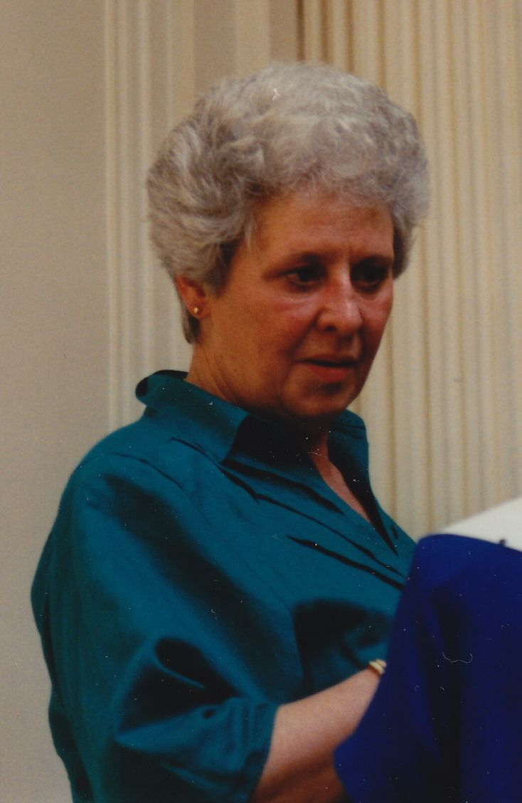 Sena Jurinac - Masterclasses Paris - Salle Gaveau Mai 1989